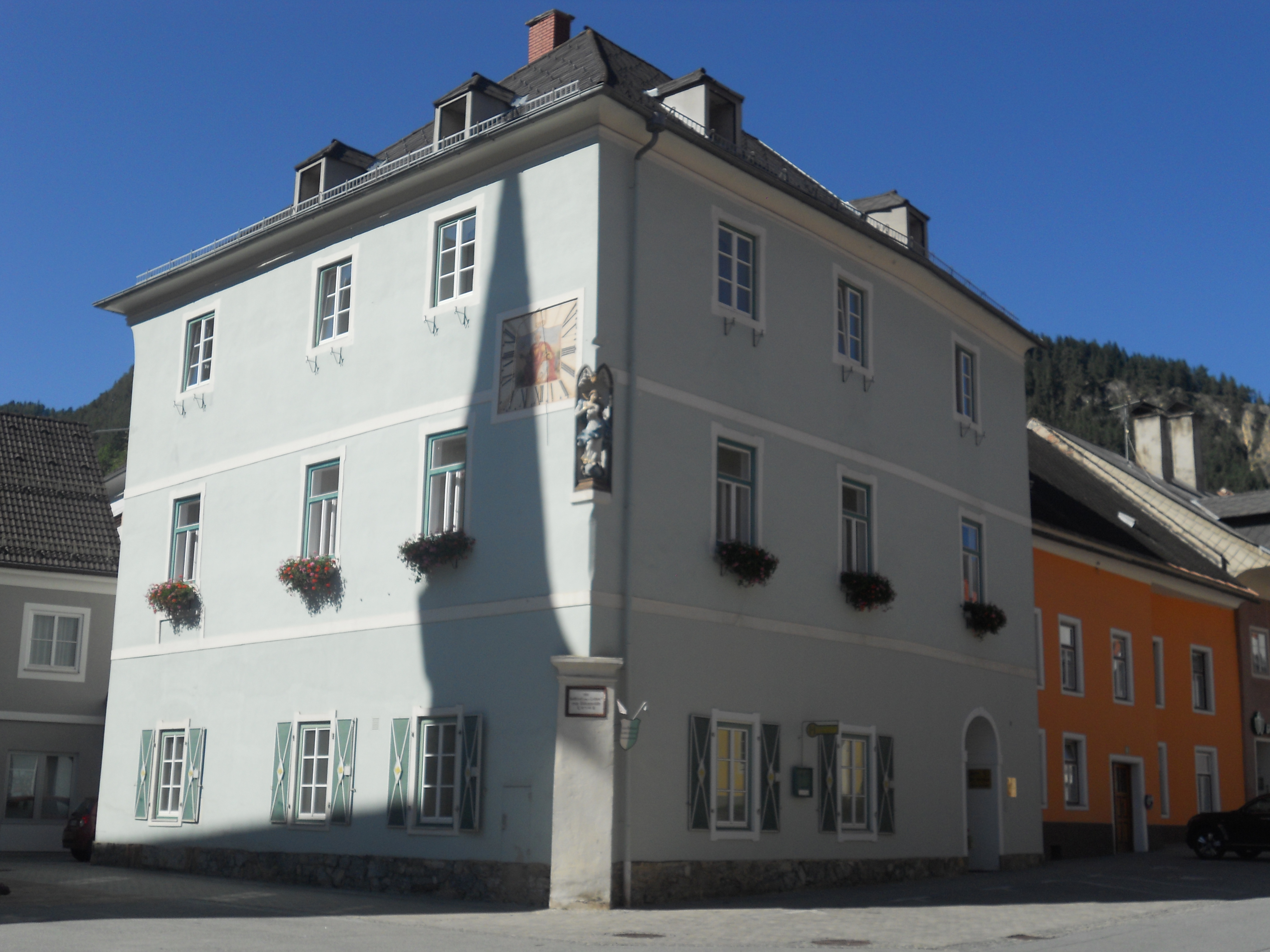 Haus Oberwölz Stadt 1, ehemaliges Rathaus und Gerichtsgebäude Dieses Foto wurde im Rahmen des von Wikimedia Österreich unterstützten Projekts Wiki takes oberes Murtal erstellt. The making of this work was supported by Wikimedia Austria. For other files made with the support of Wikimedia Austria, please see the category Supported by Wikimedia Österreich.